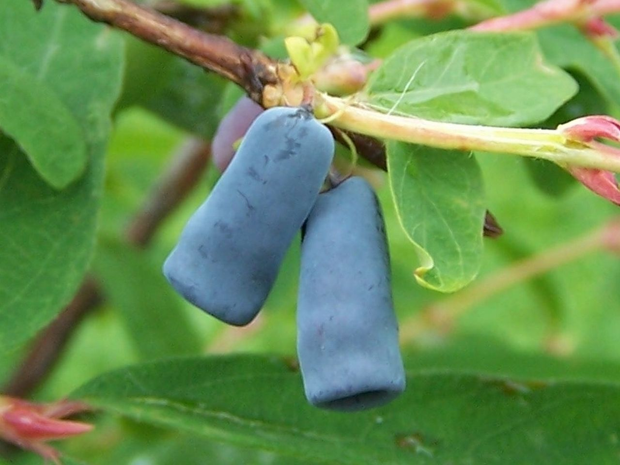 Species Lonicera caerulea (pl. wiciokrzew siny, jagoda kamczacka) Family Caprifoliaceae